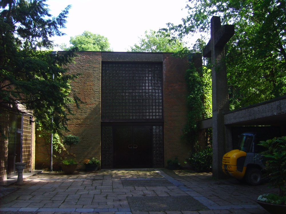 Neue Friedhofskapelle des lutherischen Friedhofs an der Hochstraße, Wuppertal-Elberfeld, Germany